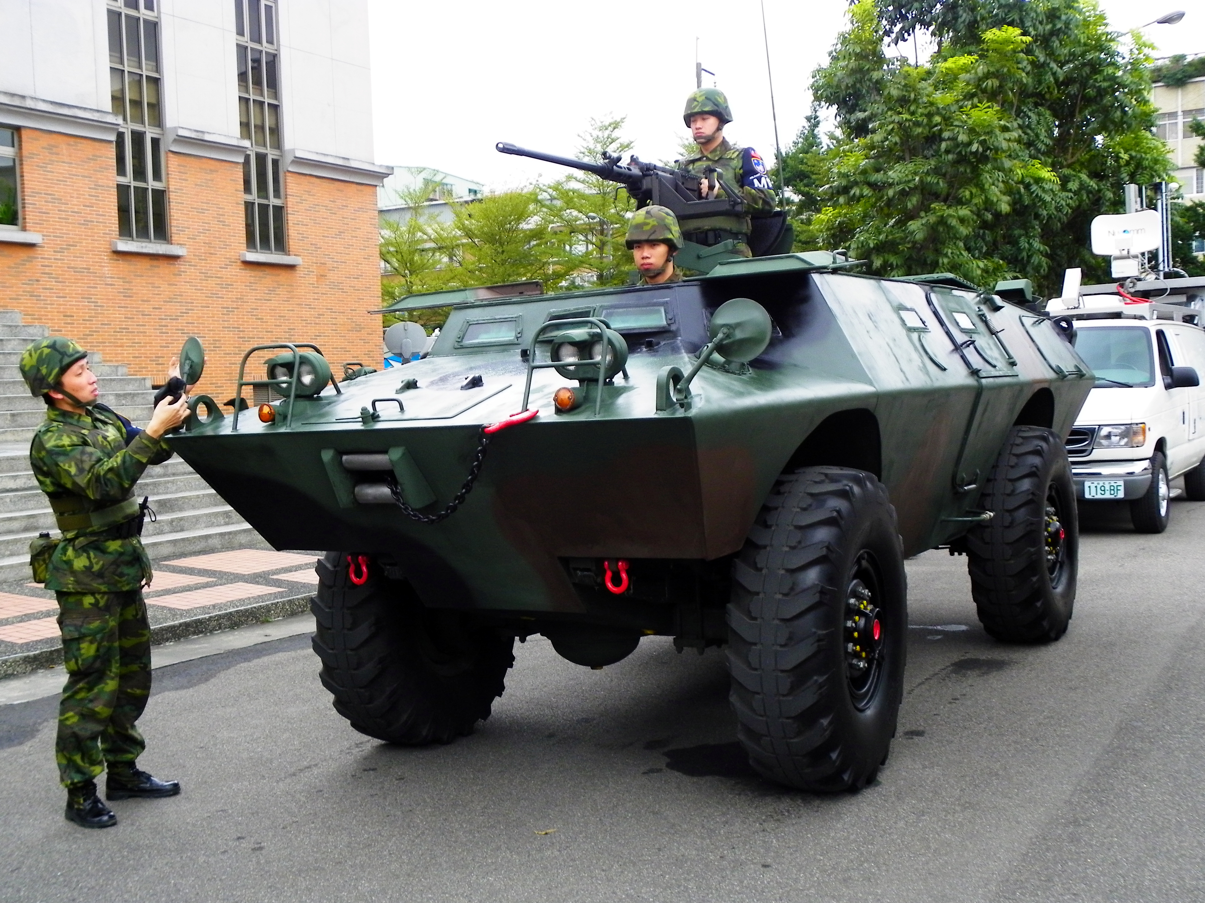 中華民國憲兵紀念日校閱前，裝甲憲兵營戰士為V-150裝甲車調整照後鏡。